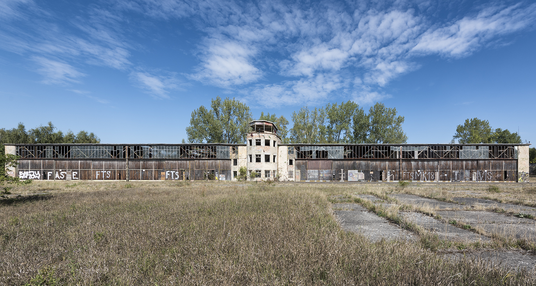 Flugplatz Rangsdorf, Ansicht der Einfliegerhalle gegen Norden.